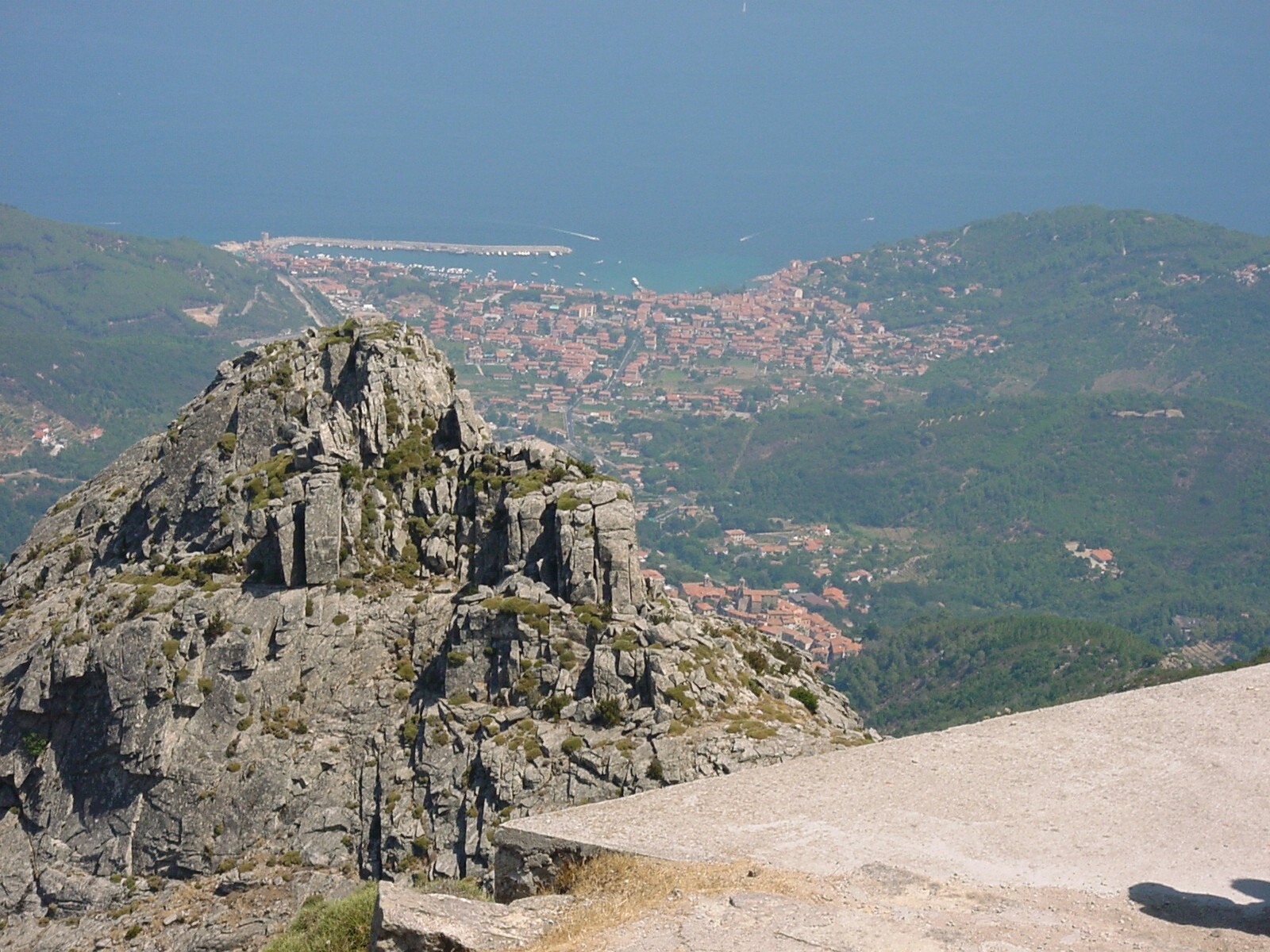 Elb Monte Capanne